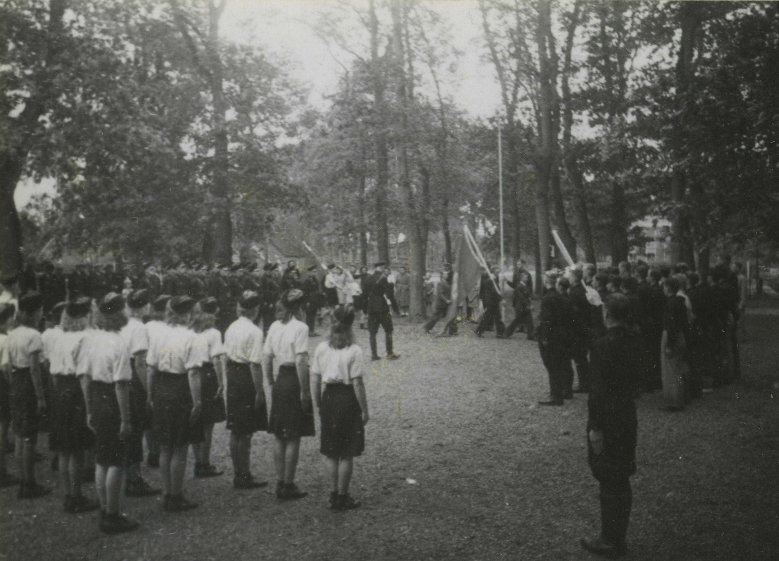 Oogsthulp in Tynaarlo, Drenthe, door leden van het Studentenfront. Het kamp duurde van 6 t/m 16 augustus 1942. Alleen 's morgens werd geoogst. Deze foto is afkomstig uit het archief van de Fotodienst der NSB.